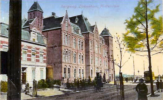 Het Bergwegziekenhuis in Rotterdam. Foto van prentbriefkaart uit nl:1910, fotograaf onbekend.